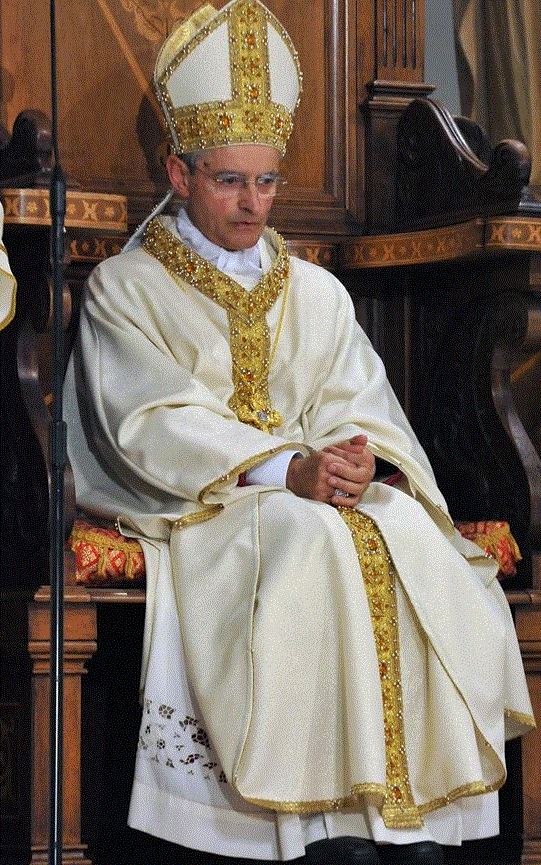 arturo aiello